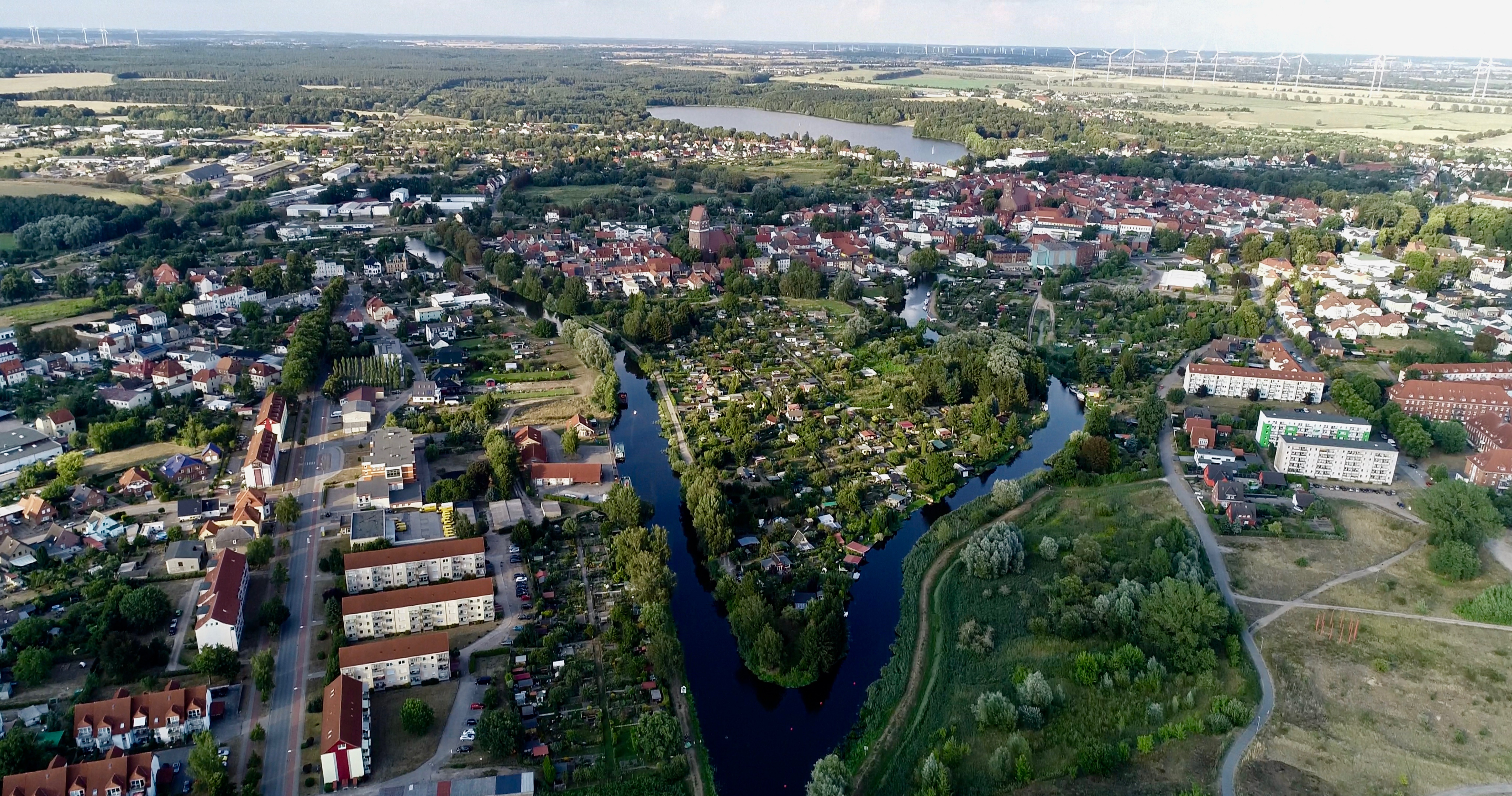 Historisches Zentrum mit dem Wockersee, und zwei der Eldearme, welche die Stadt durchfließen.